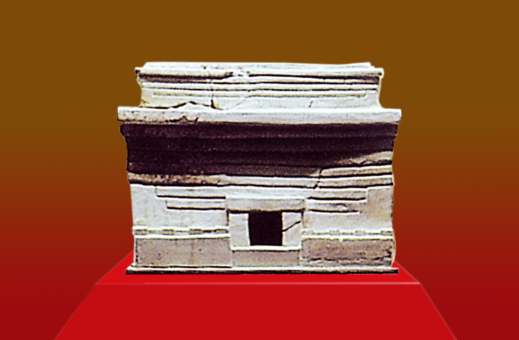 modèle de temple mégalithique maltais découvert sur le site de Tarxien